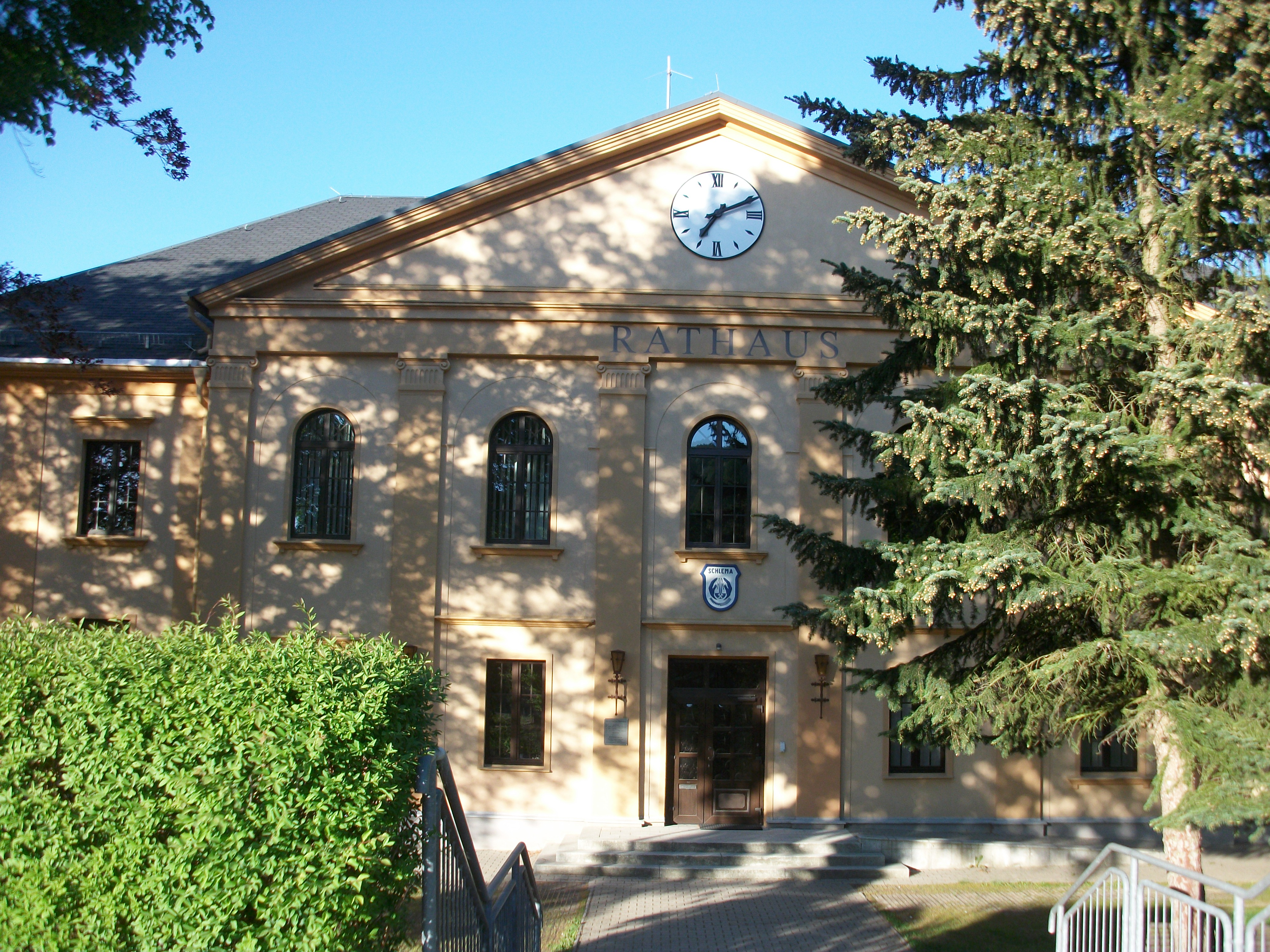 Rathaus Bad Schlema, Hauptgebäude